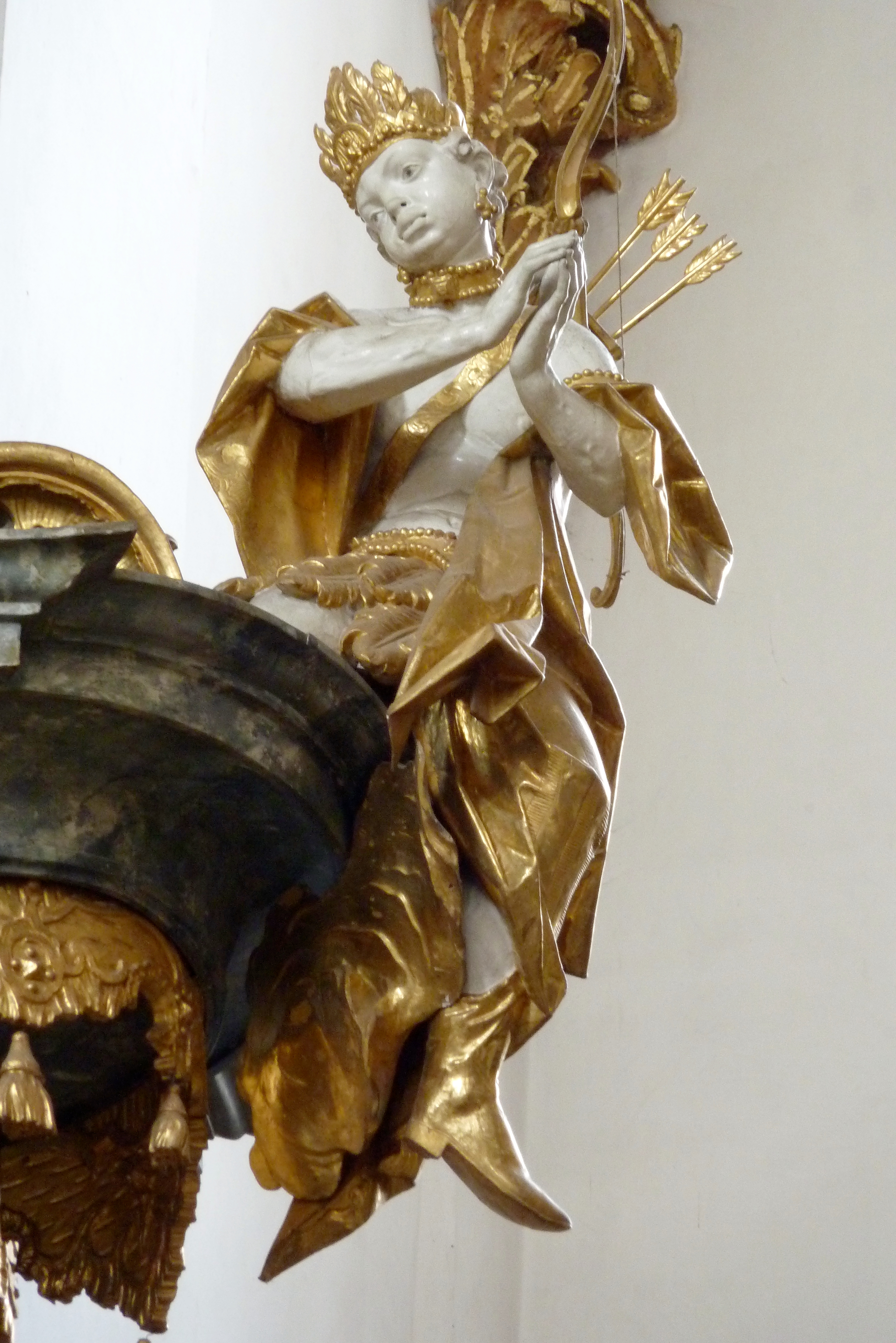 Studienkirche Mariä Himmelfahrt in Dillingen an der Donau, Kanzel von dem Bildhauer Johann Michael Fischer, allegorische Darstellung Amerikas